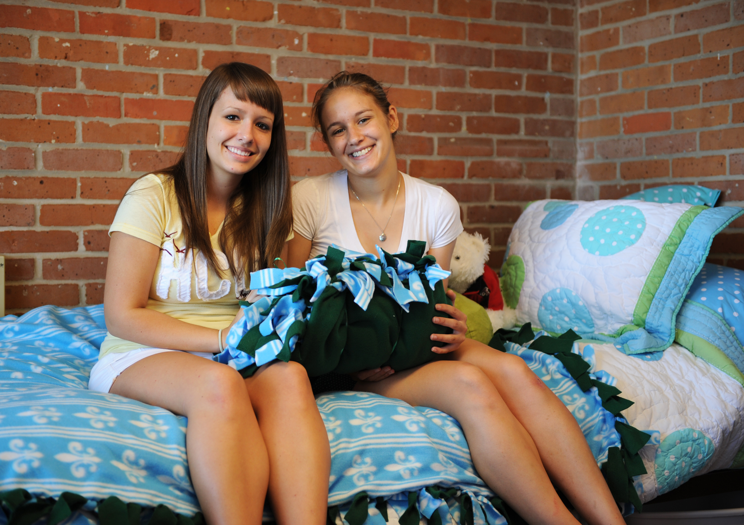 Roommates